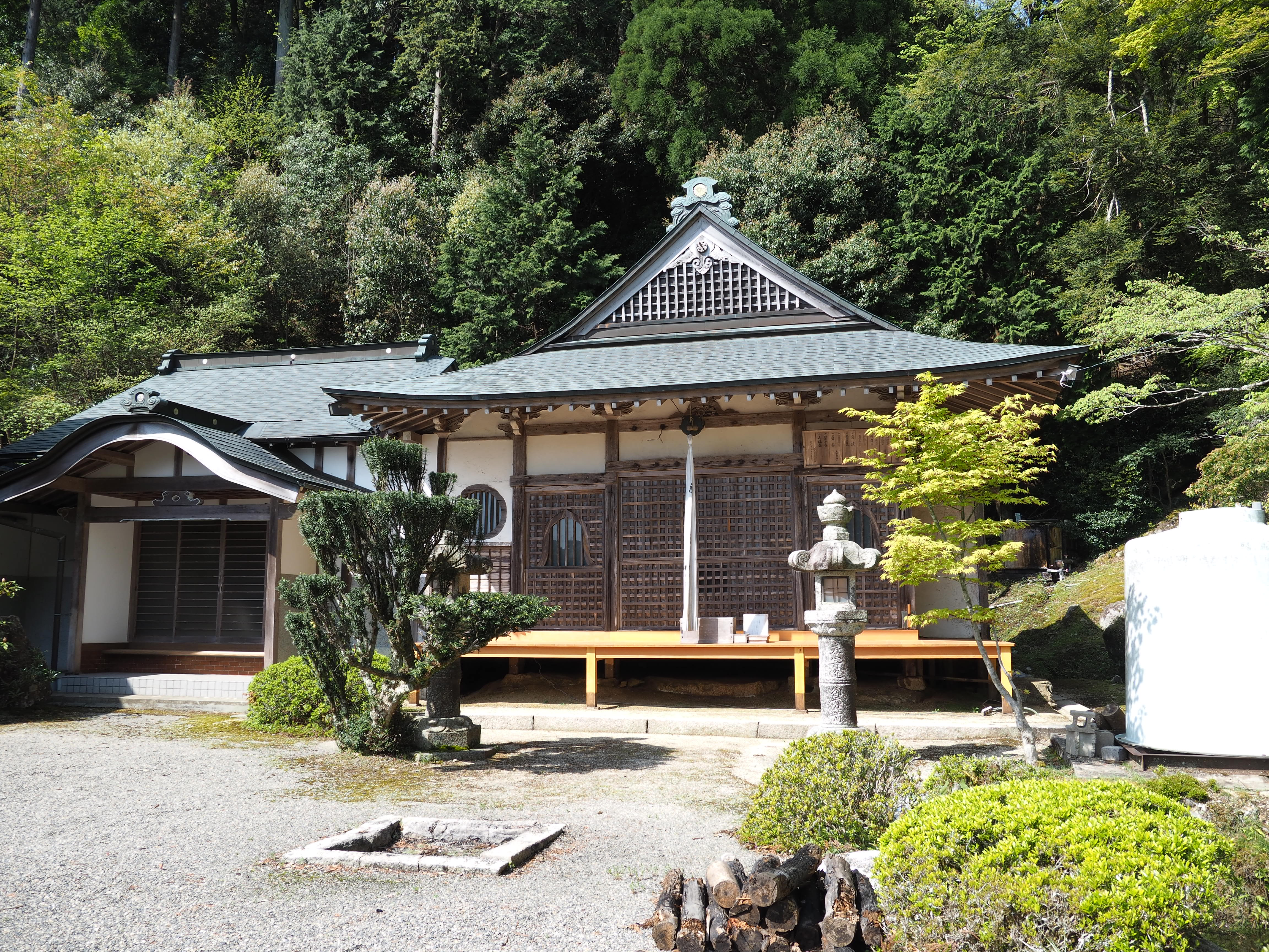 滋賀県甲賀市甲南町にある岩尾山息障寺の本堂